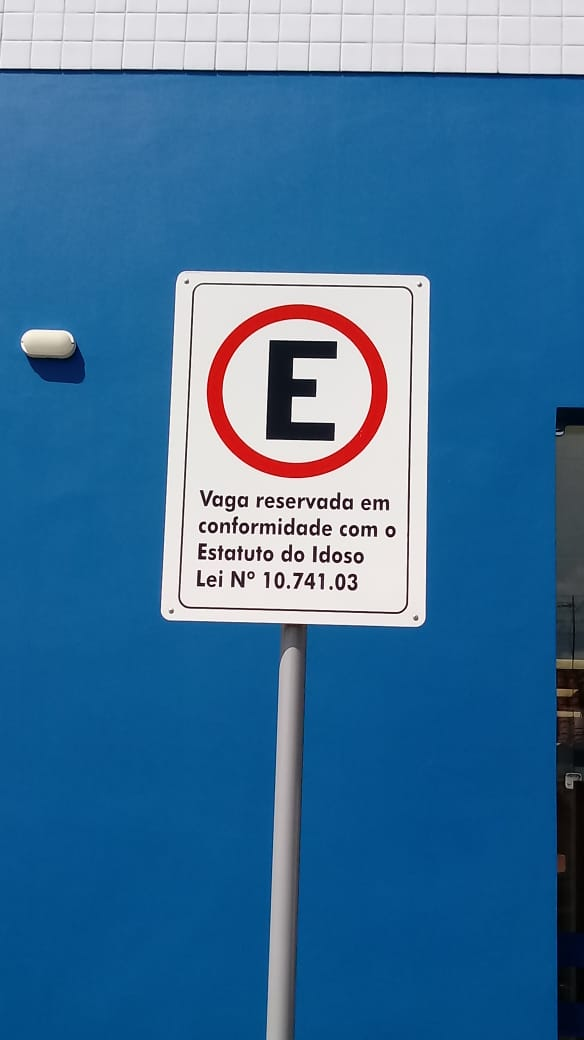 Placa de estacionamento nos conformes da lei do Estatuto do idoso na Caixa Econômica Federal em Campo Maior, Piauí.